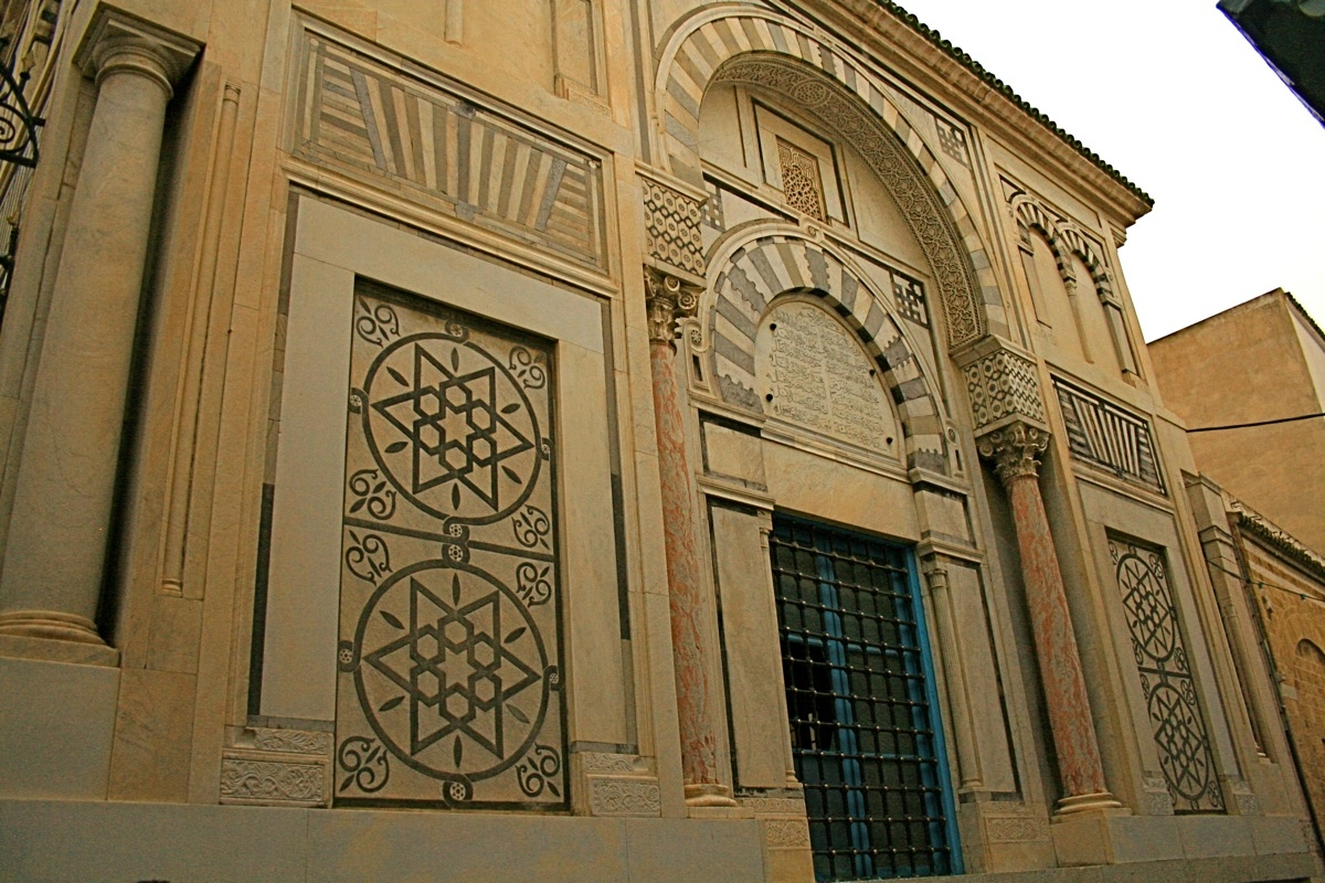 Façade de la mosquée Hammouda Pacha ans la médina de Tunis (Tunisie)